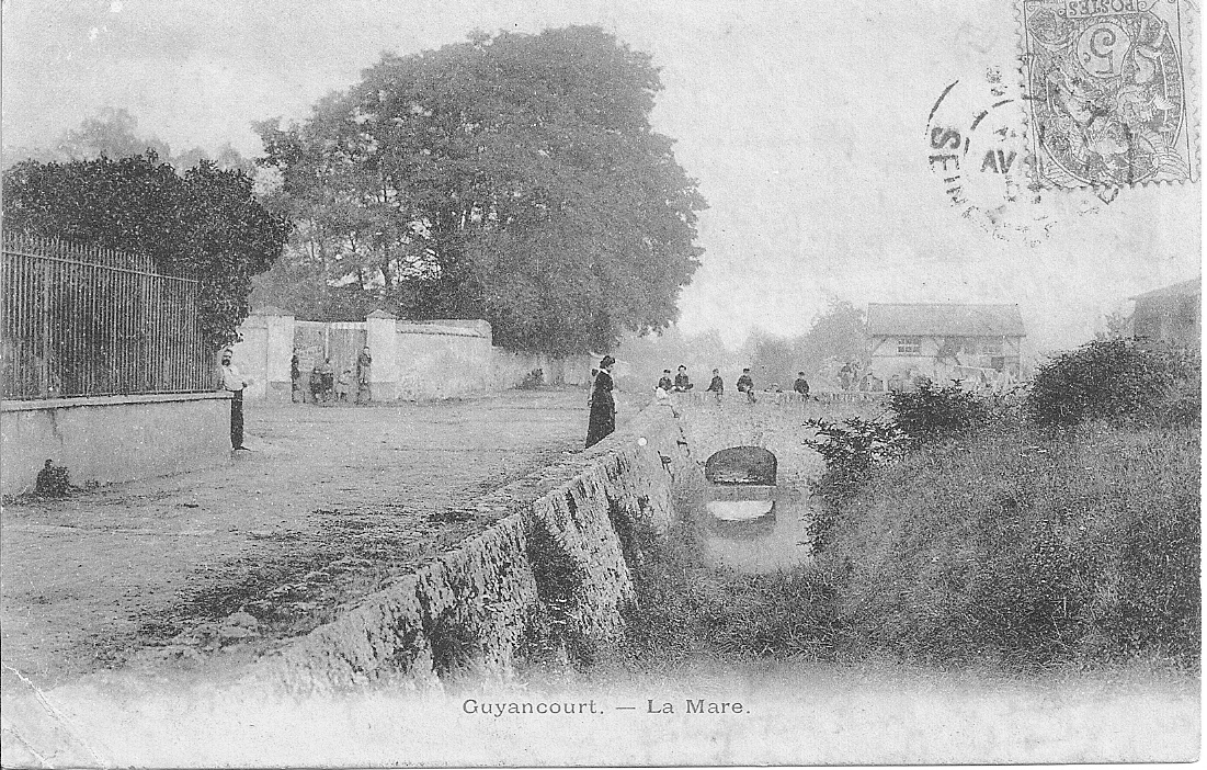 Vue de la rigole, rue de la Noel